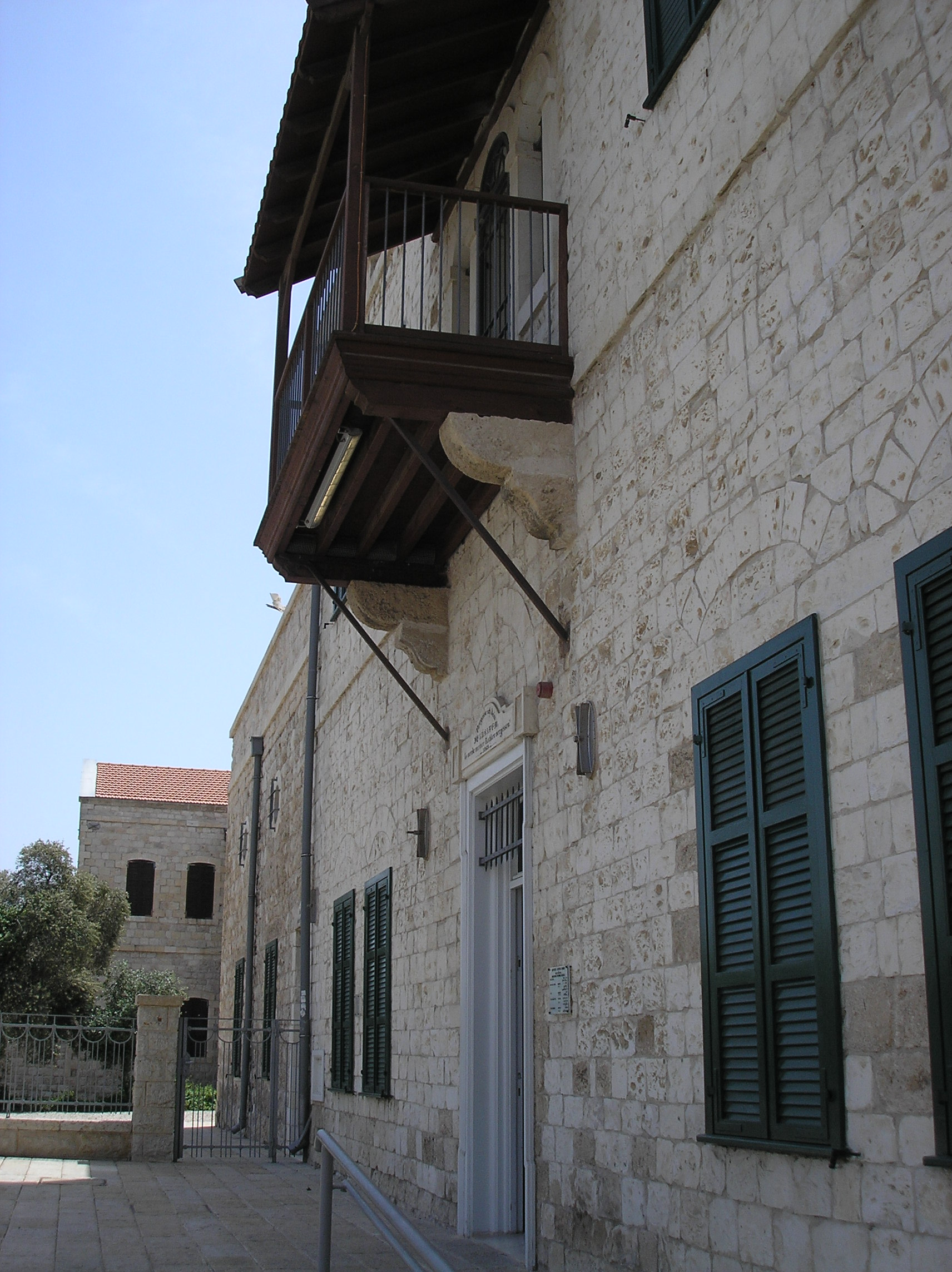 Beit Haam - detail בית העם בחיפה - כיום מוזיאון העיר חיפה